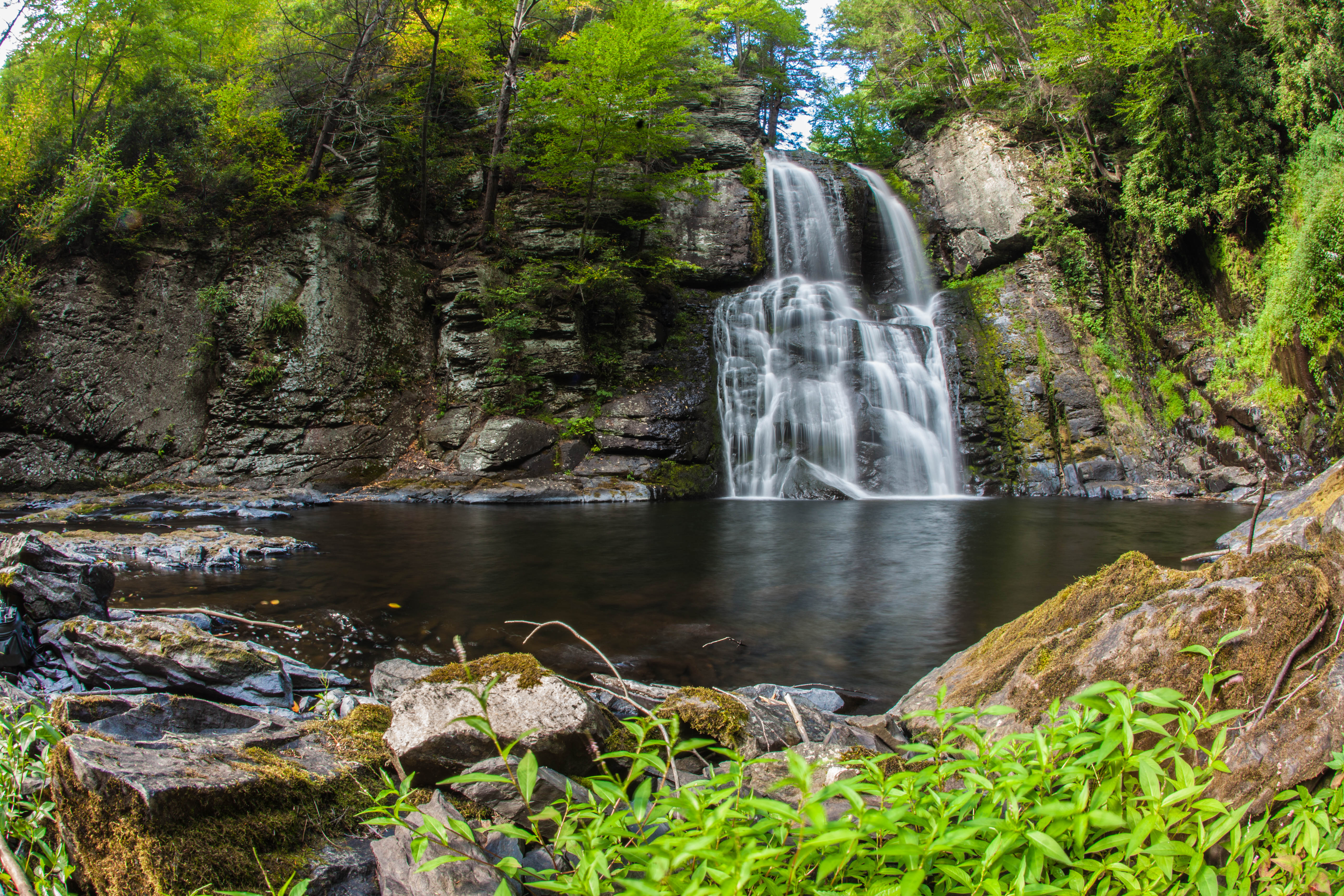 Bushkill Falls, Pennsylvania